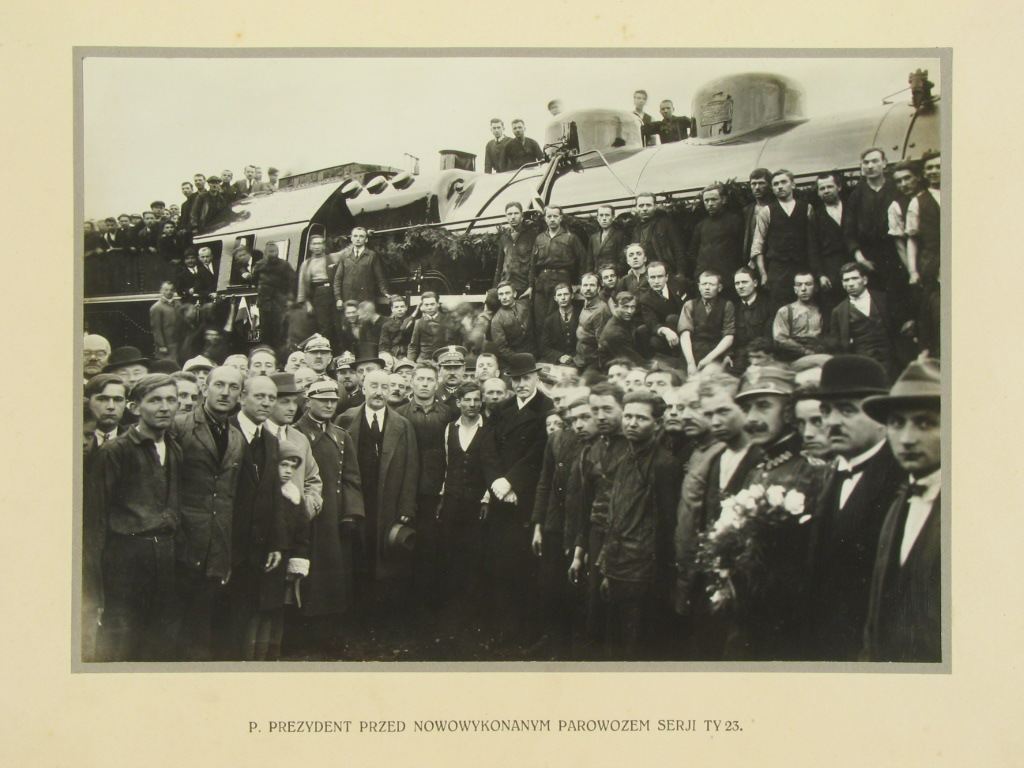 Wizyta prezydenta Mościckiego w Fabloku